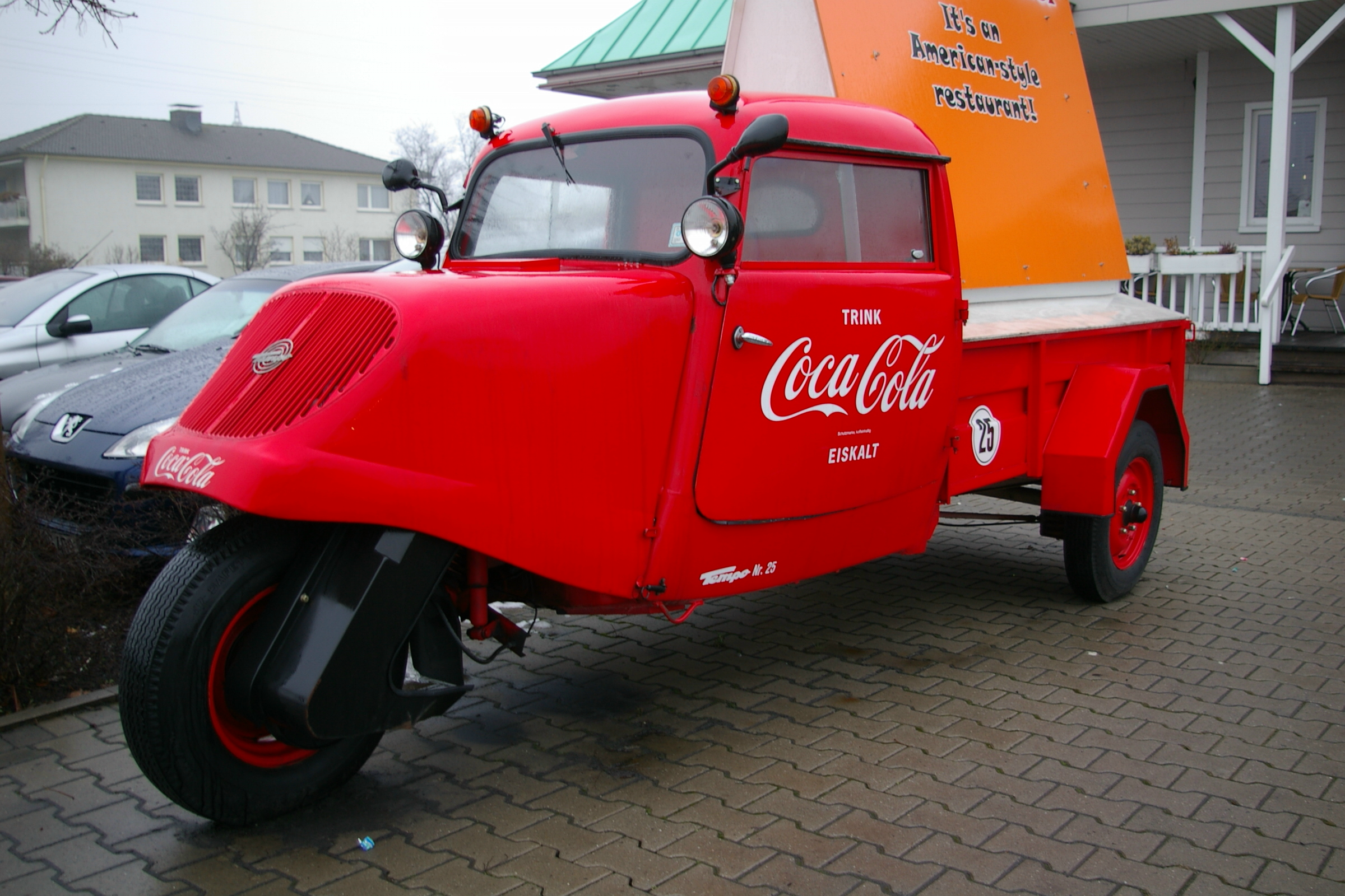 Tempo Matador von Bajaj/Indien als Werbeträger vor einem "Dinner American Style" im Kreis Unna